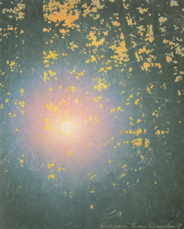 Fontainebleau, 1897